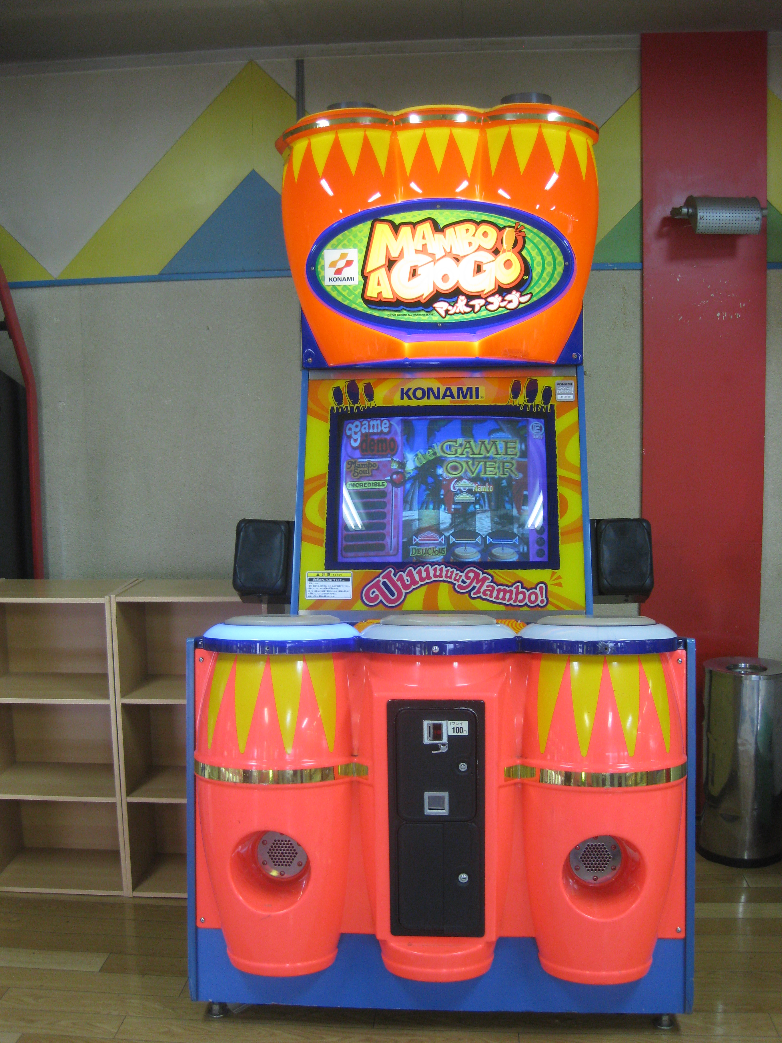 マンボ・ア・GOGOの筐体参考画像